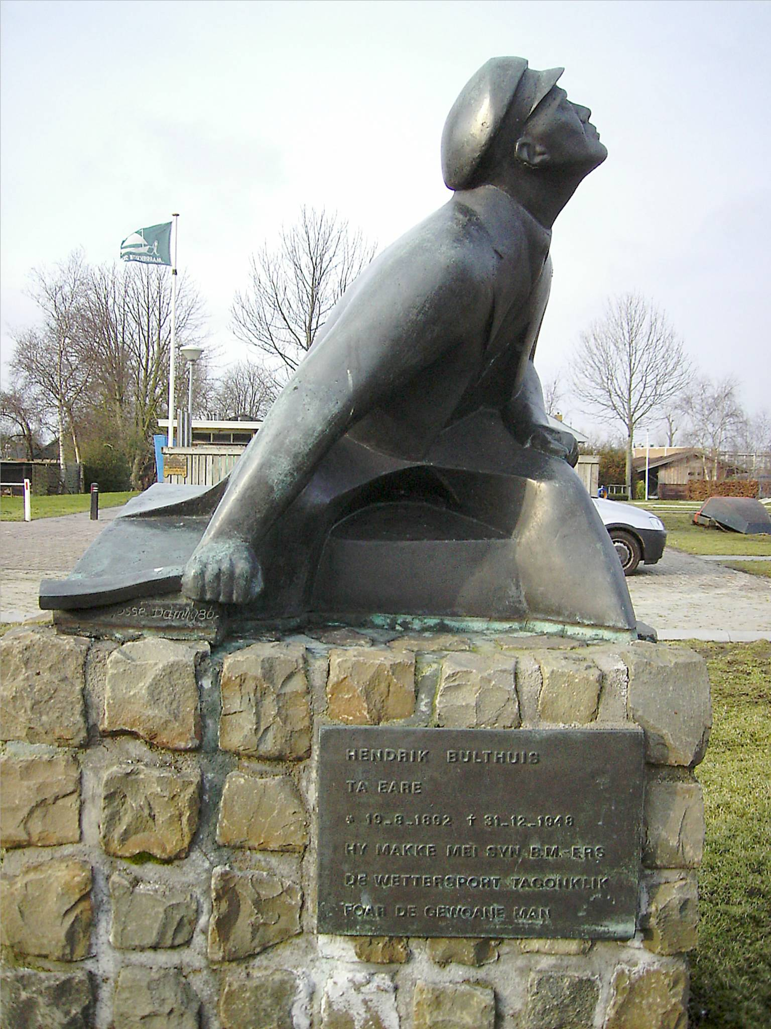 Gosse Dam,1986